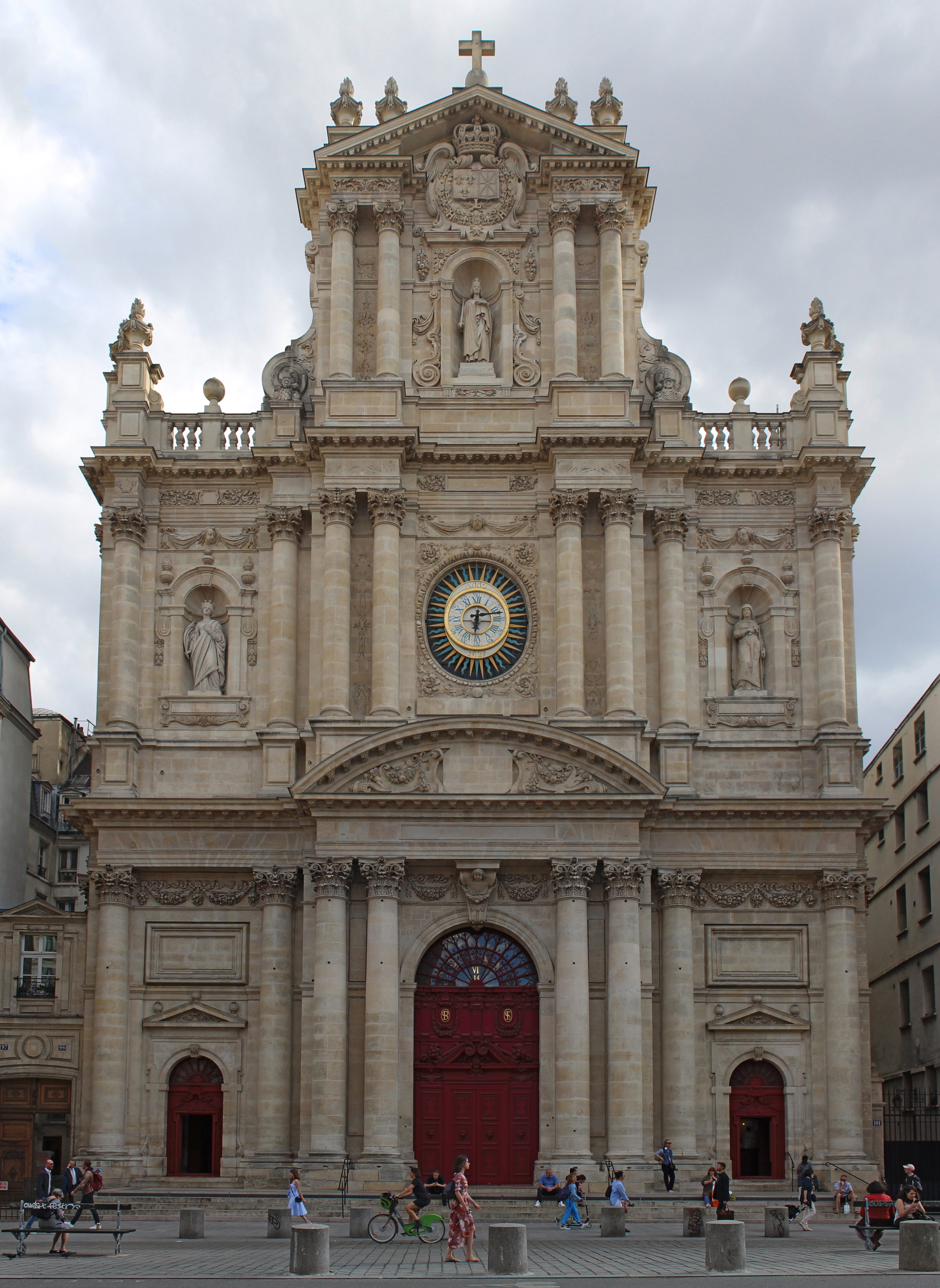 Église Saint-Paul-Saint-Louis de Paris.